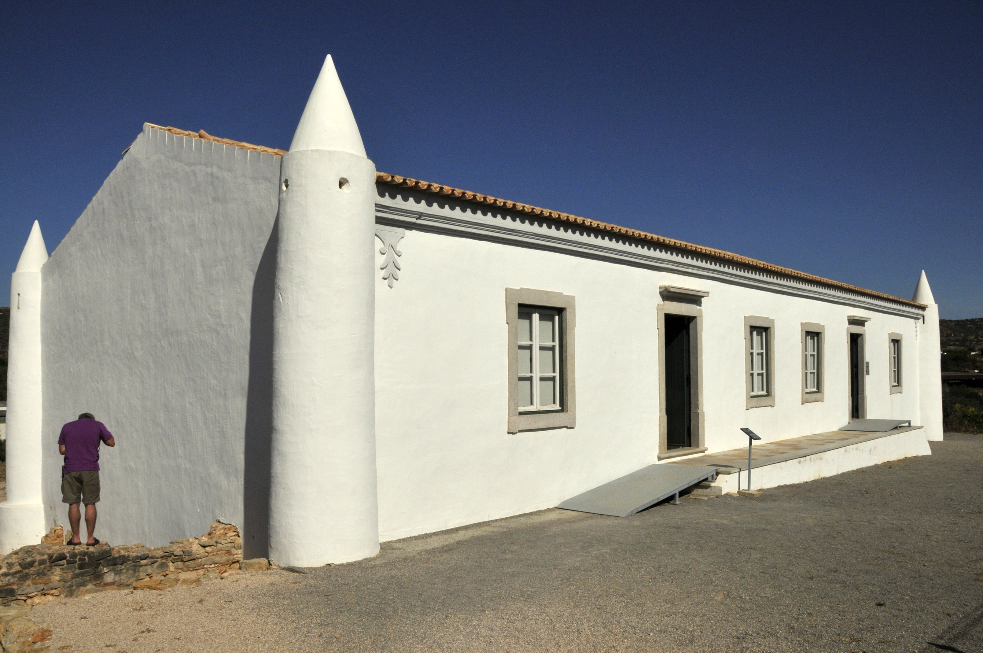 Gutshaus in Milreu